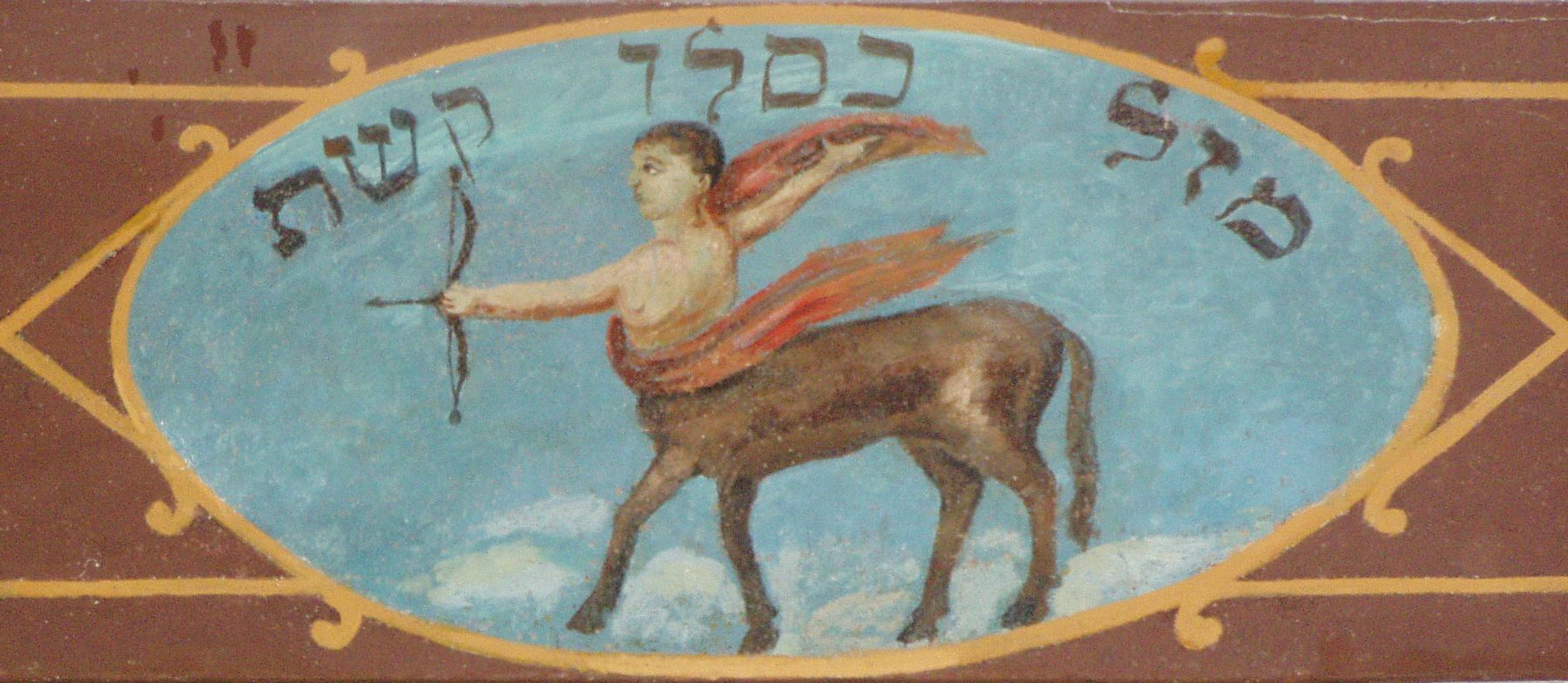 Znaki zodiaku na belkowaniu galerii dla kobiet synagogi Kupa w Krakowie